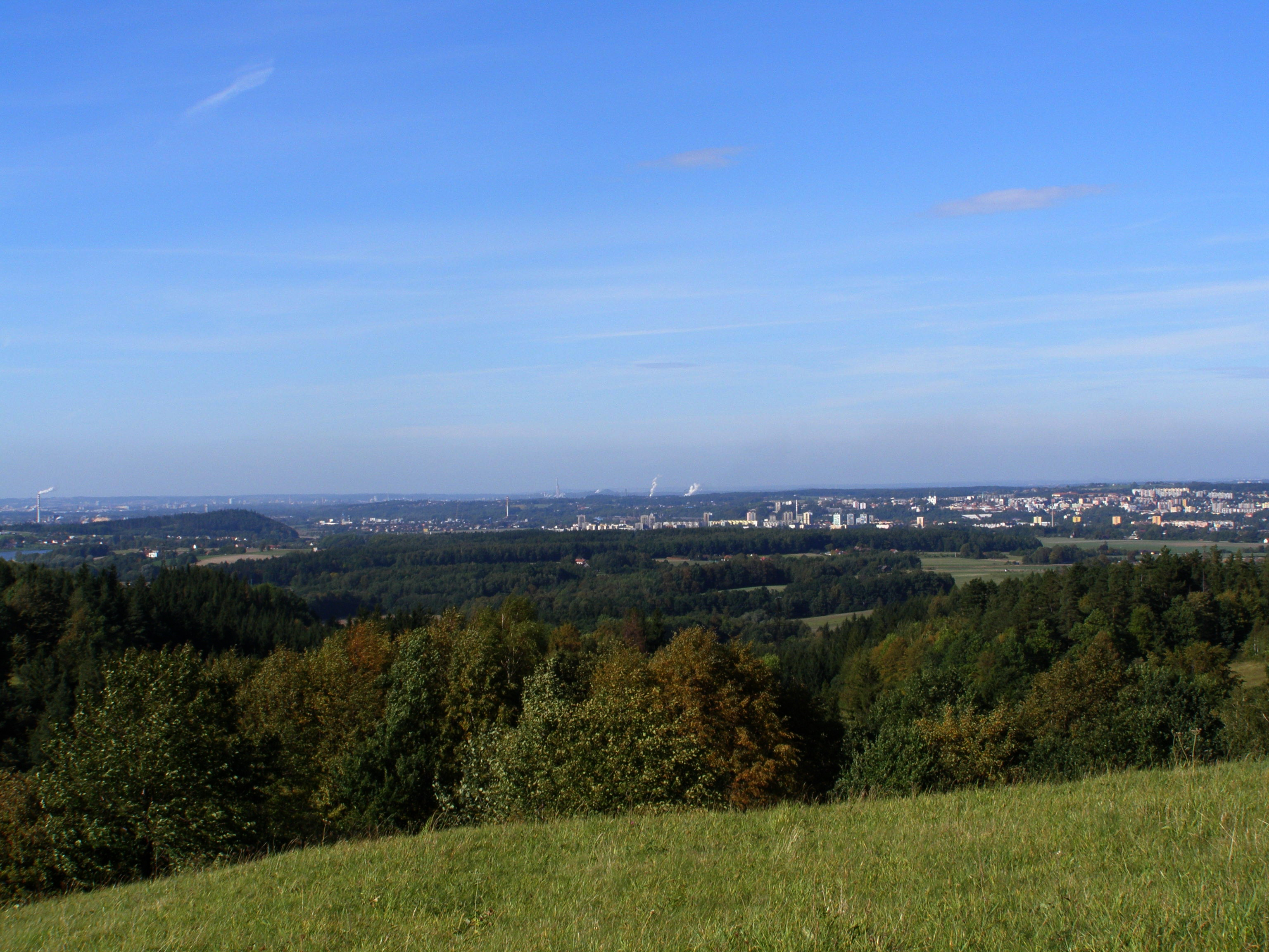 Frýdek-Místek, pohled z Metylovské hůrky, zleva: Vodní nádrž Olešná a kopec Štandl, Sviadnov, Místek, Frýdek